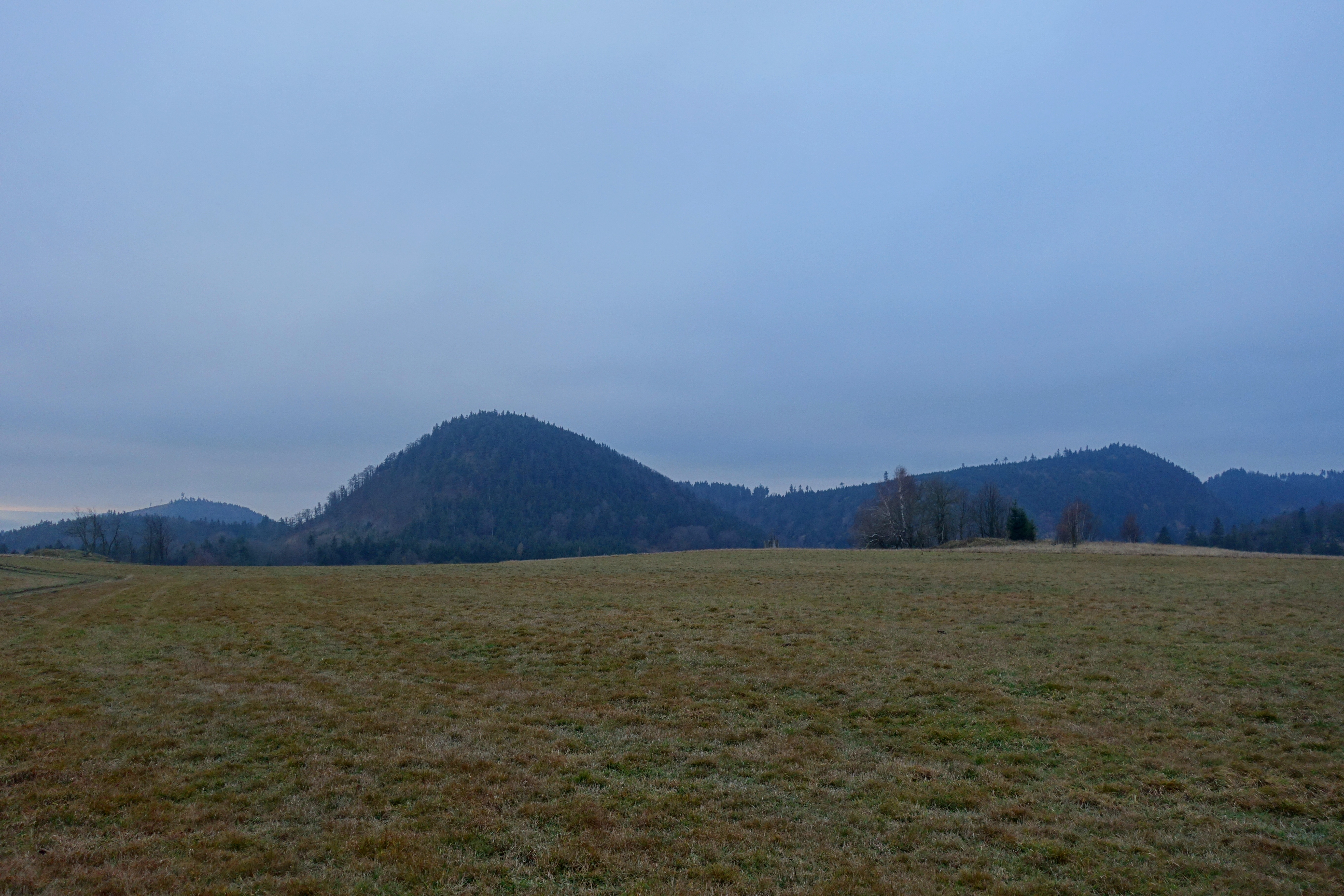 Waligóra z luk pod horou Klin